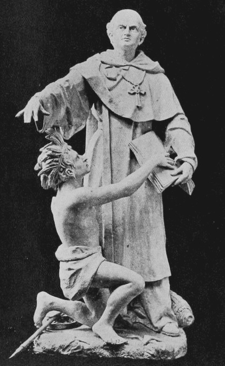 Escultura en bronce de Bartolomé de las Casas. Obra del maestro Tomás Mur en Guatemala en 1896.